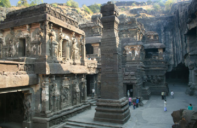 بليبسييبللب